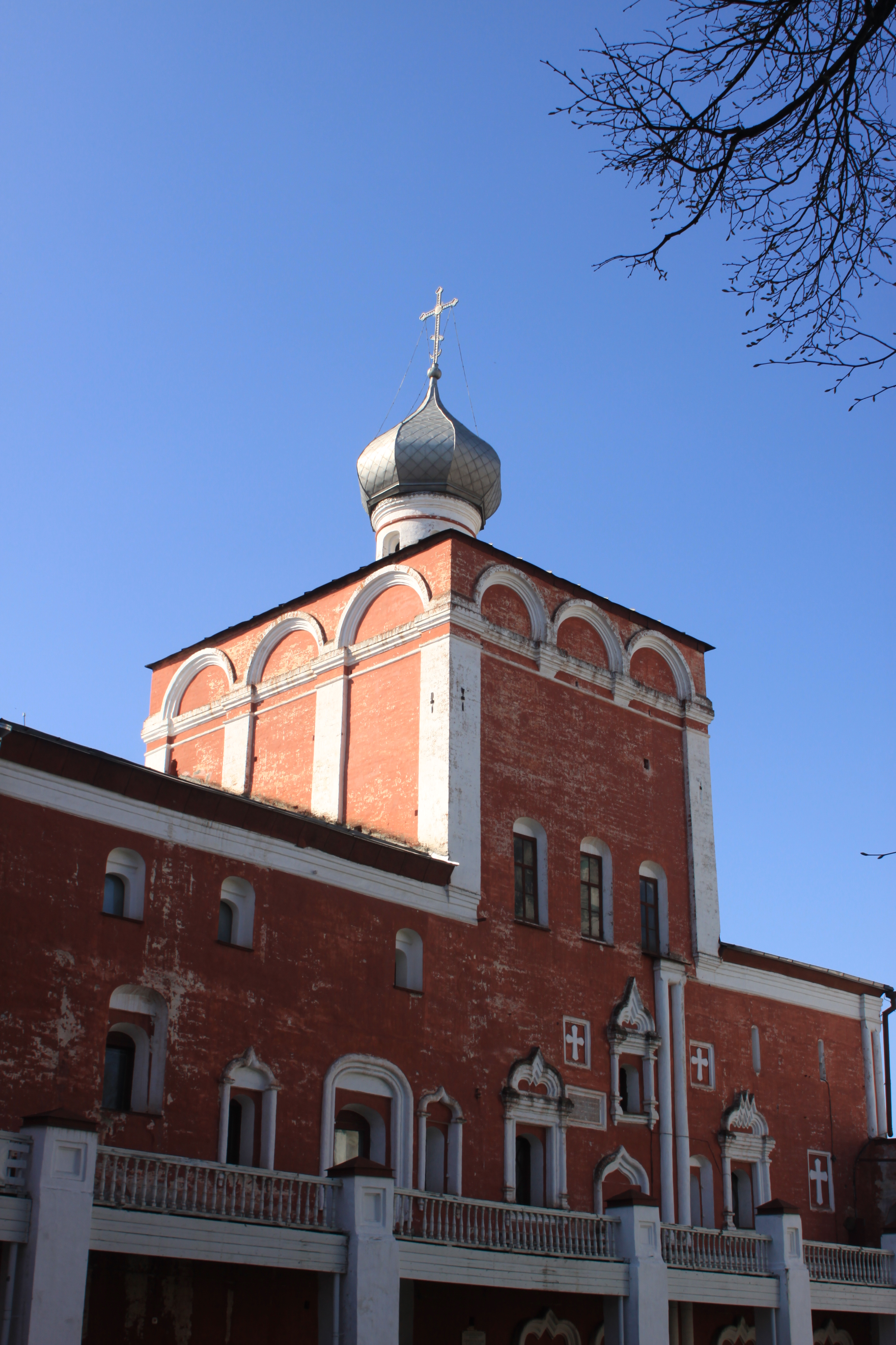 Церковь Рождества Христова Симоновского корпуса Архиерейского двора.